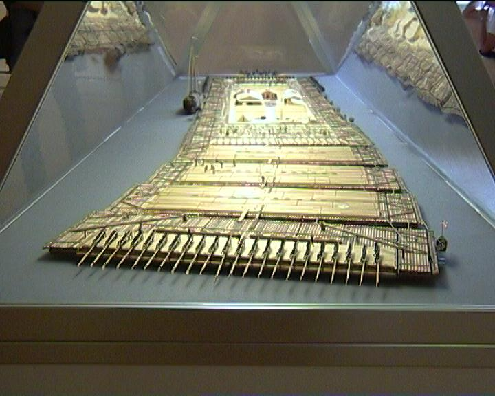 Modell eines “Holländerfloßes” im Stadtmuseum Köln, Maßstab unbekannt, ca. 1:100 geschätzt